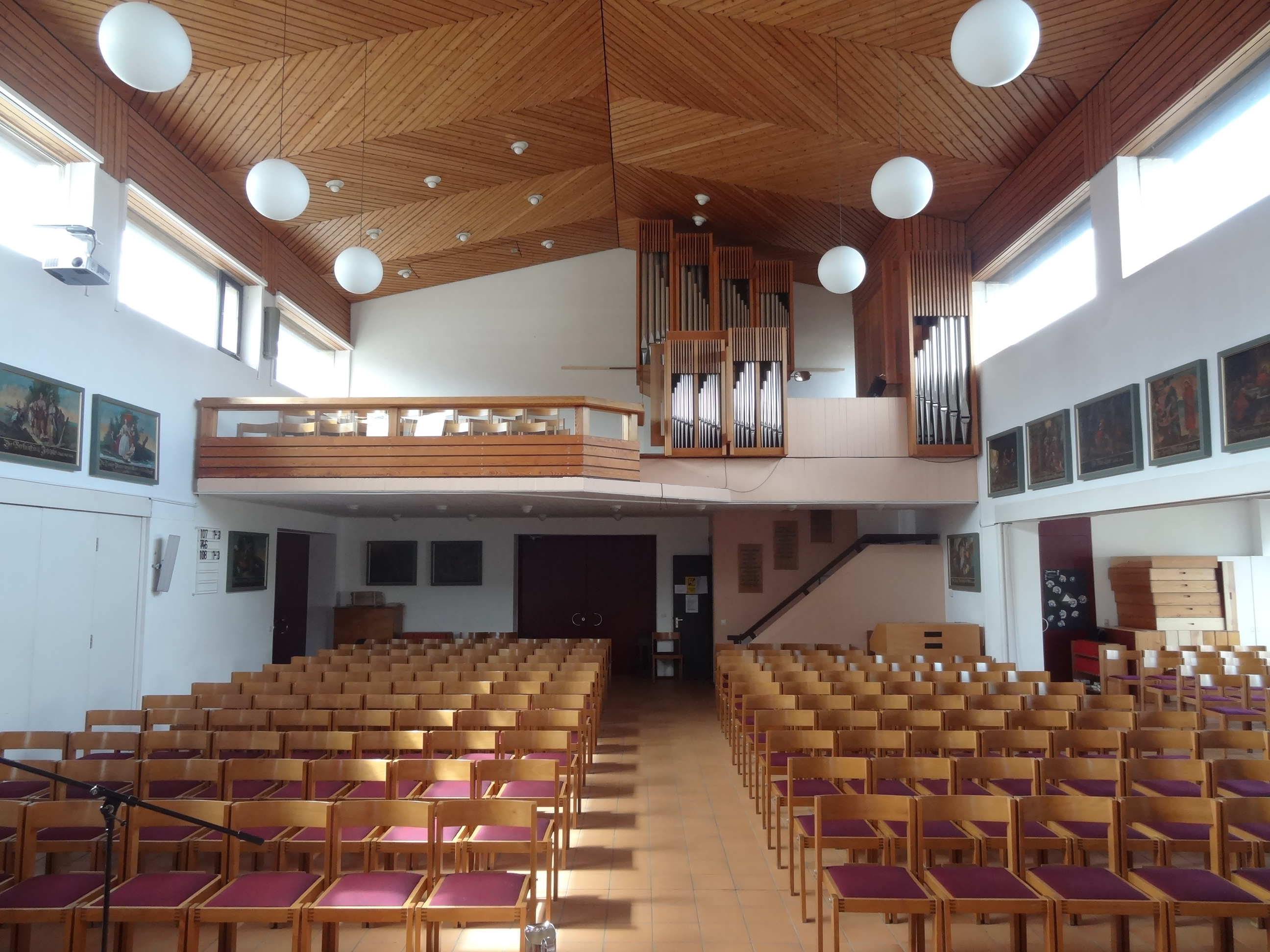 Jakobuskirche Lang-Göns